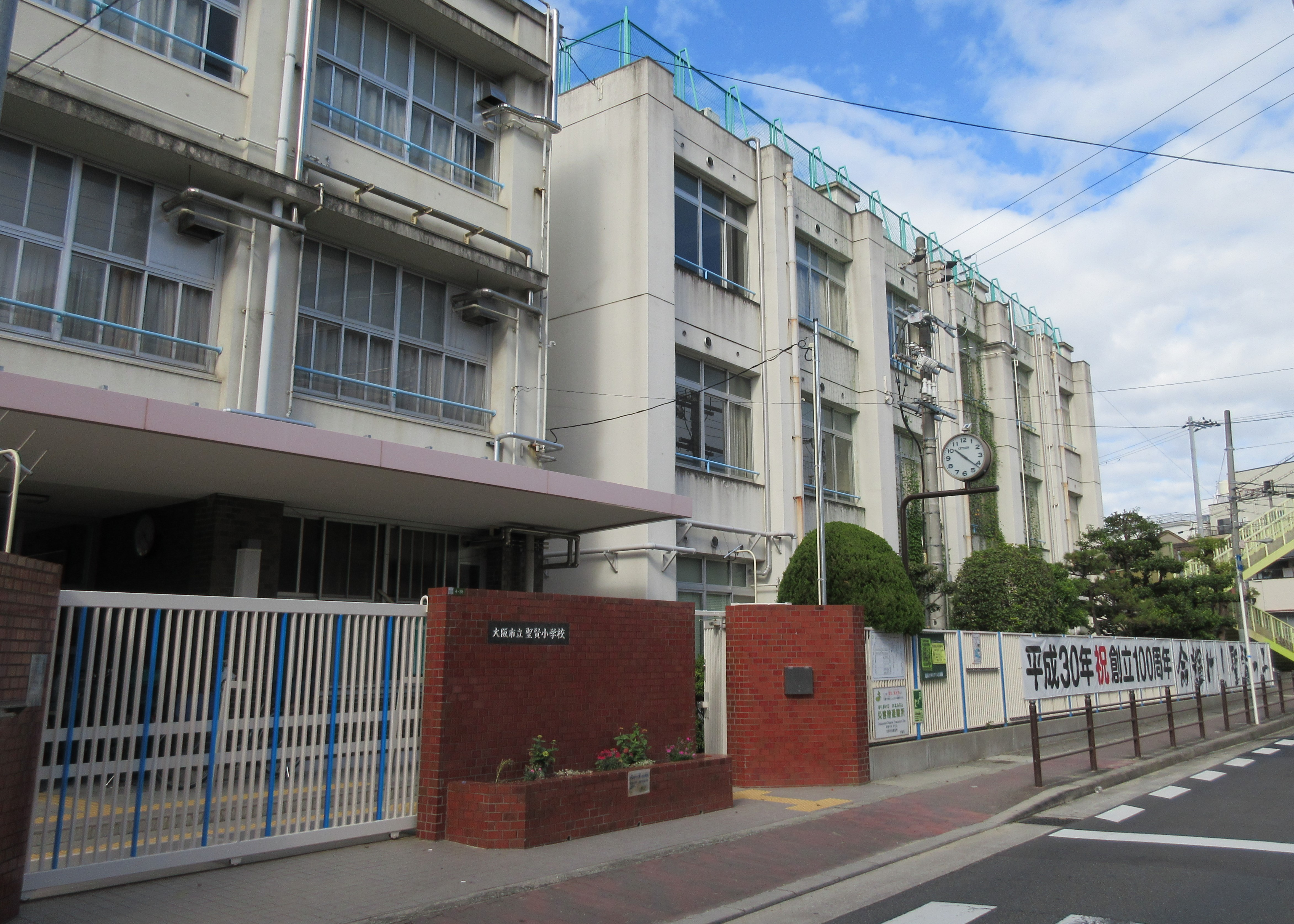 大阪市立聖賢小学校